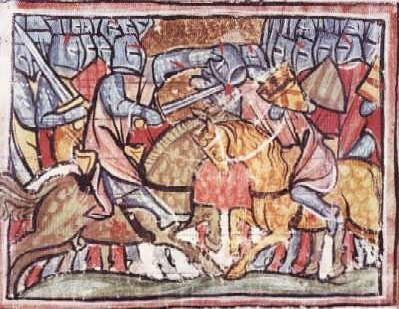 Schlacht bei Bornhöved (1227)